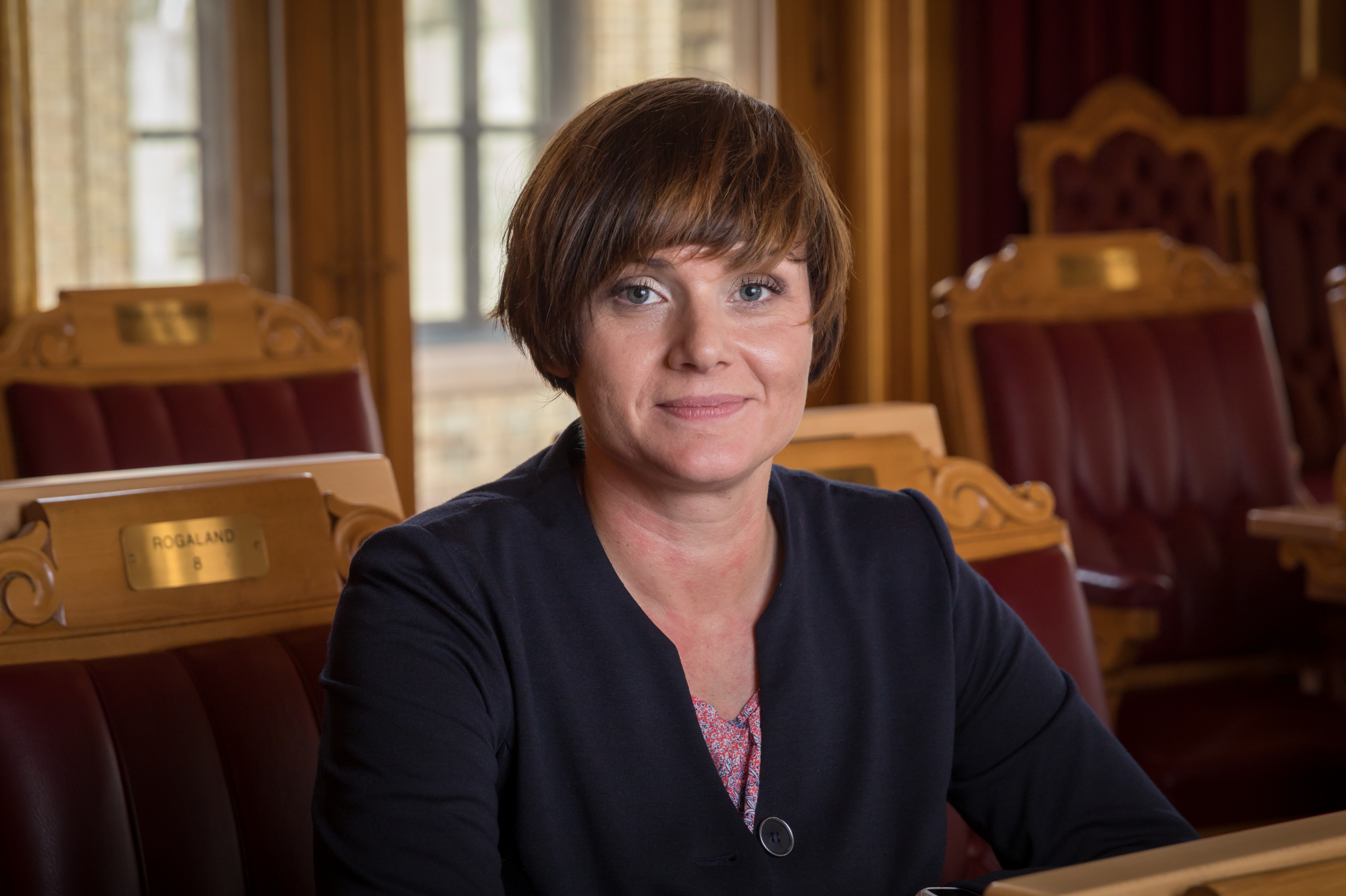 Margret Hagerup, Høyre-politiker.